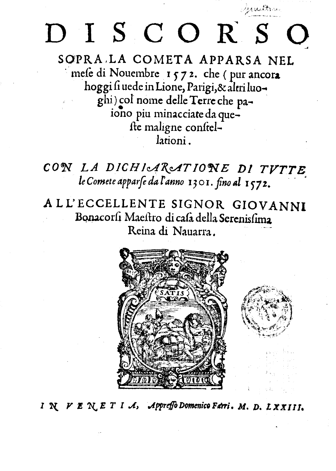 Frontespizio